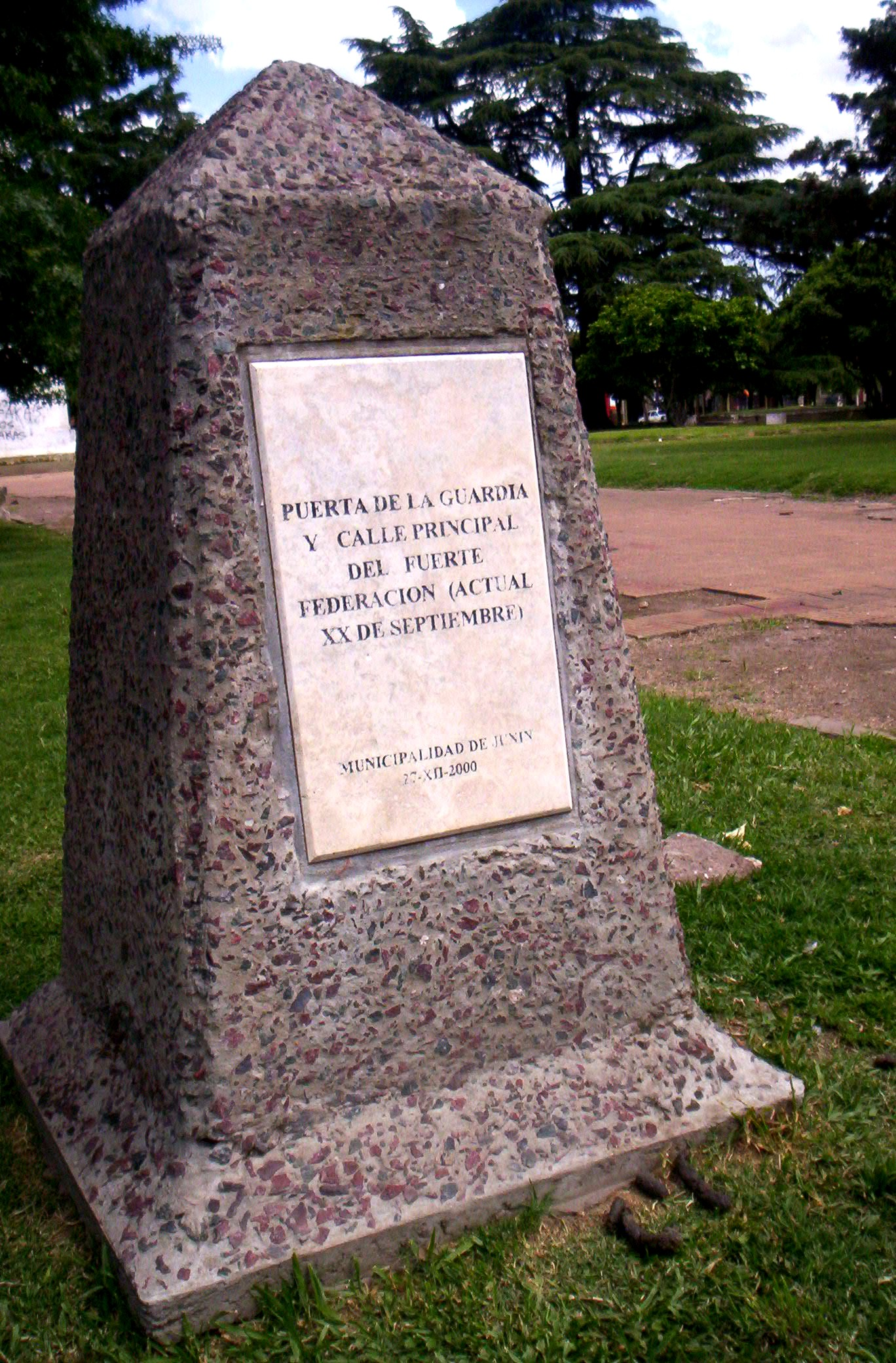 Monolito con la referencia histórica correspondiente al Fuerte Federación. Plaza 9 de Julio, Junín, Argentina.